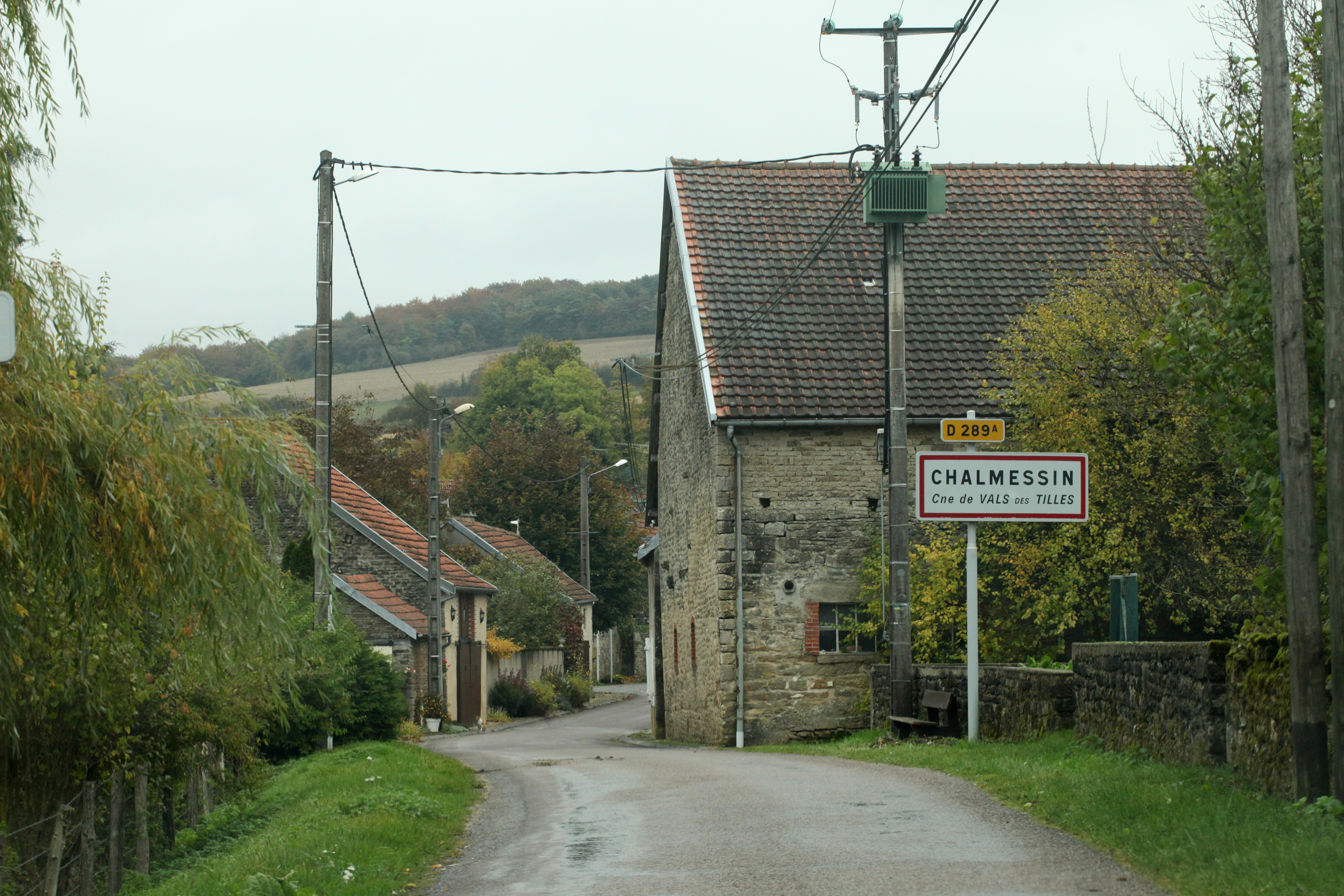 Entrée du village de Chalmessin (Haute-Marne).